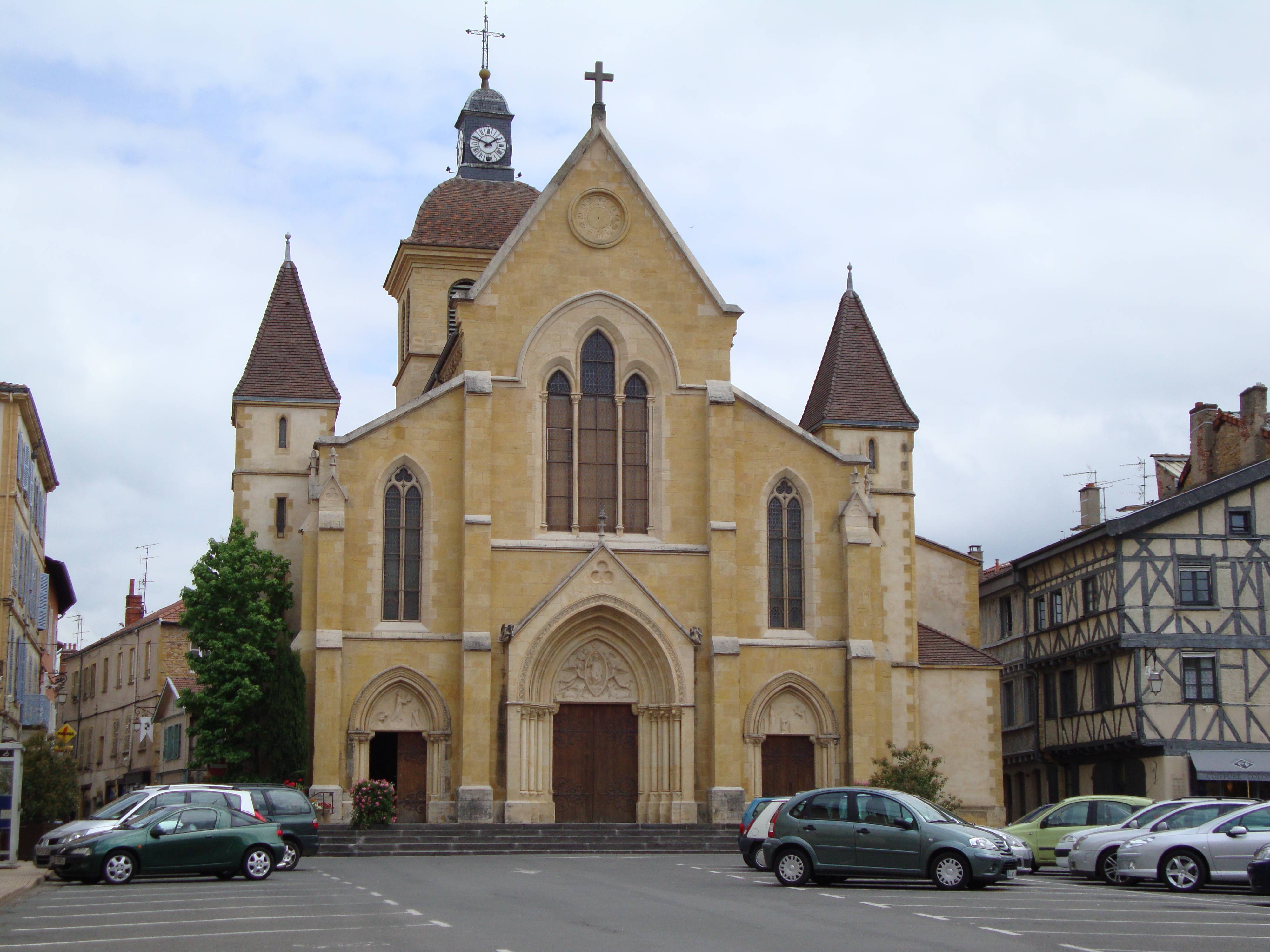 Charlieu (Loire, Fr) église paroissiale St.Philibert